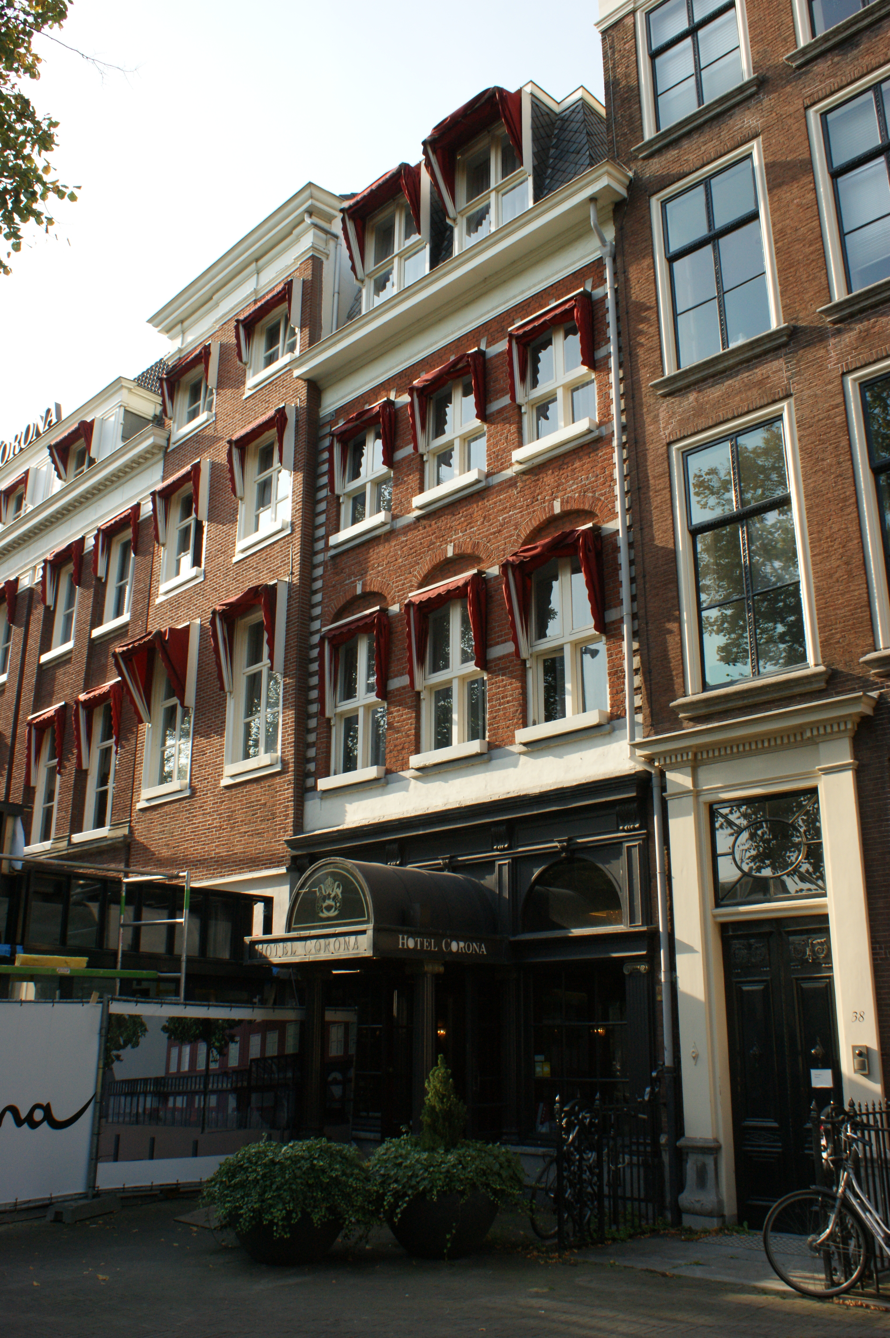 entree van hotel Corona op het Buitenhof in Den Haag